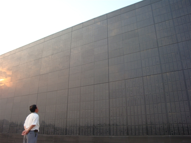 中文（中国大陆）: 唐山地震遗址纪念公园